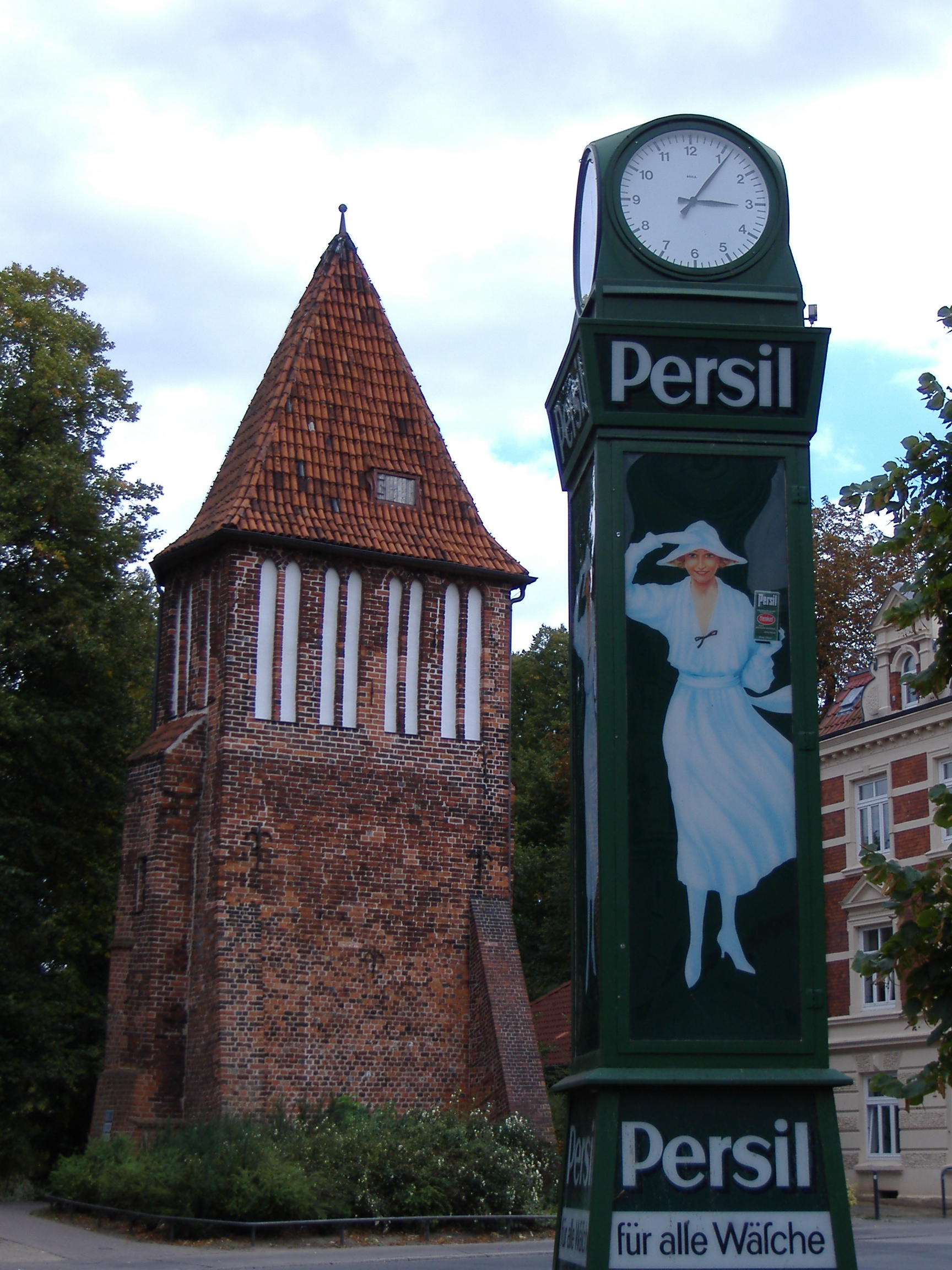 alter Wasserturm in Wismar (Mecklenburg Vorpommern) mit Persil-Uhr